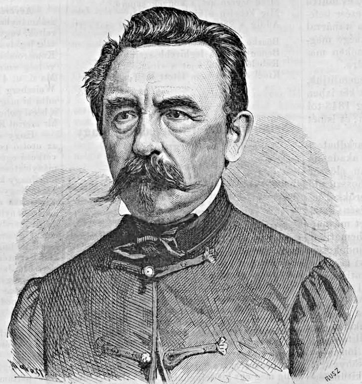 Petzvál Ottó (1809–1883) mérnök-matematikus, egyetemi tanár, az MTA tagja. Rusz Károly metszete Marastoni József litográfiája alapján (Vasárnapi Ujság, 1867. szeptember 1.)